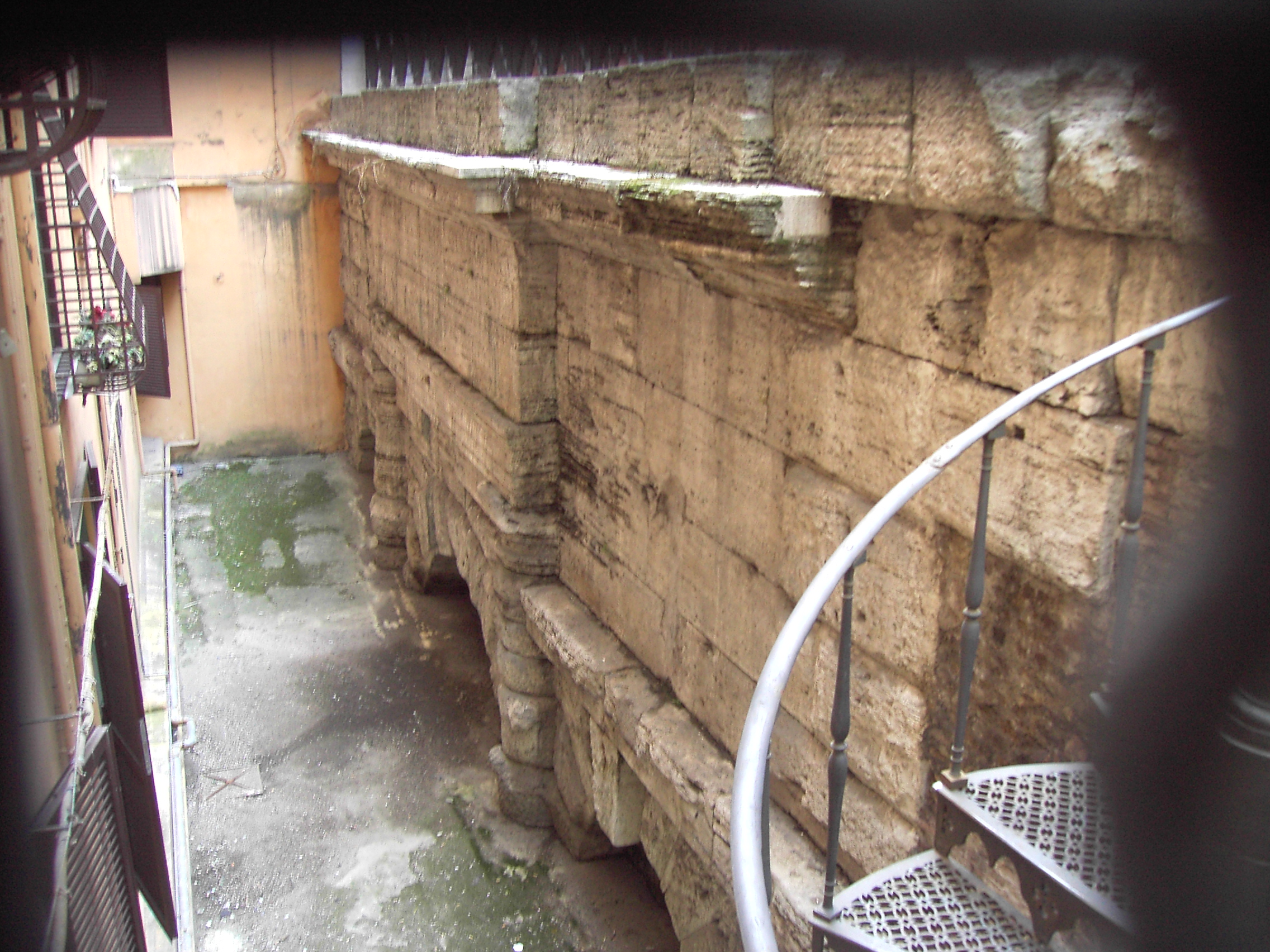 Roma, resti dell'acquedotto Vergine a via del Nazareno